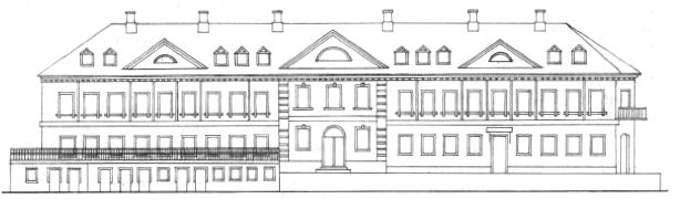 Чарцёж фасада Малога гасцінага двара